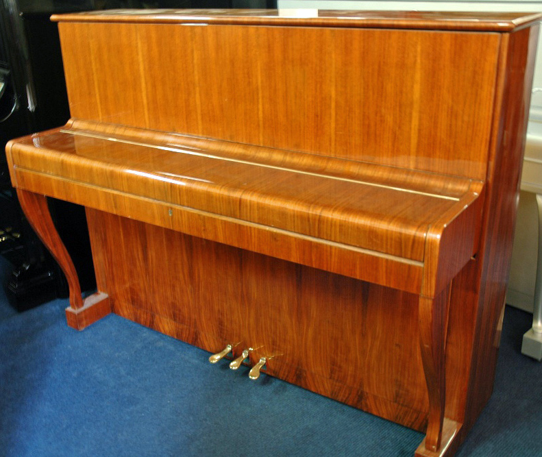 Pianino Offberg, Wersja eksportowa Legnica Offberg z 1970r.